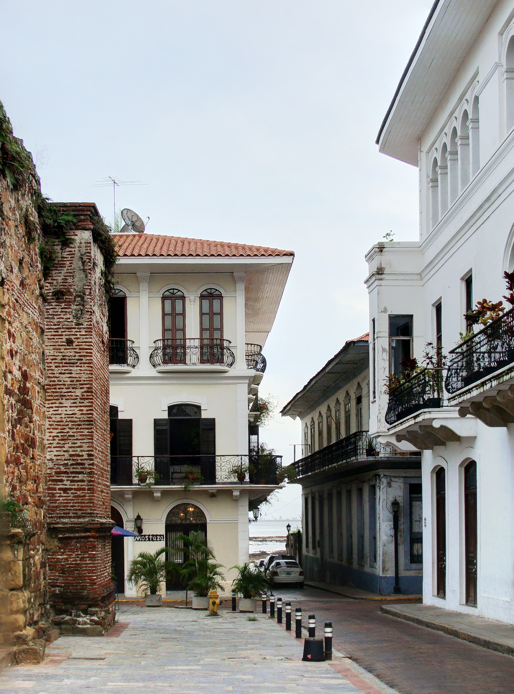 Avenida A, frente al Arco Chato.